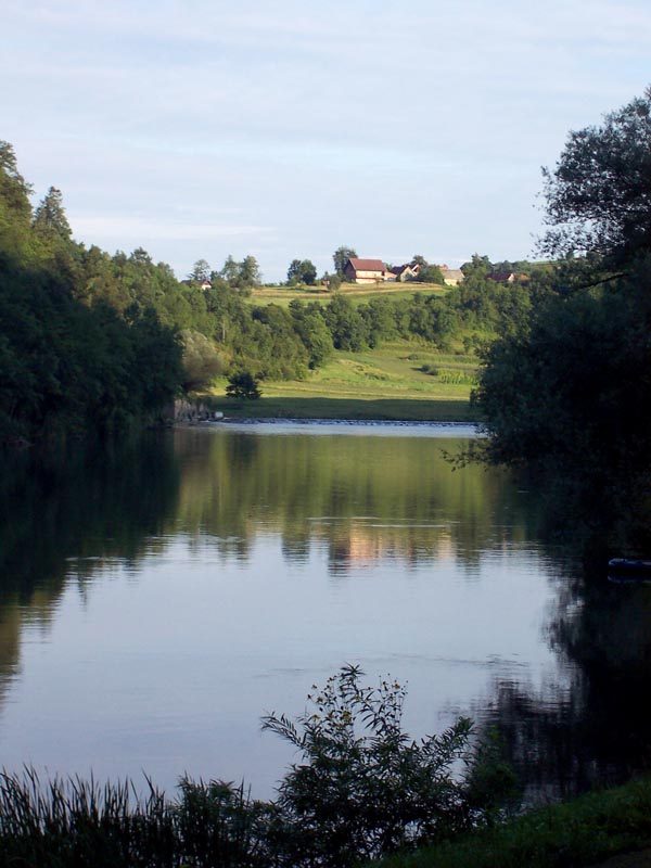 Rijeka Kupa